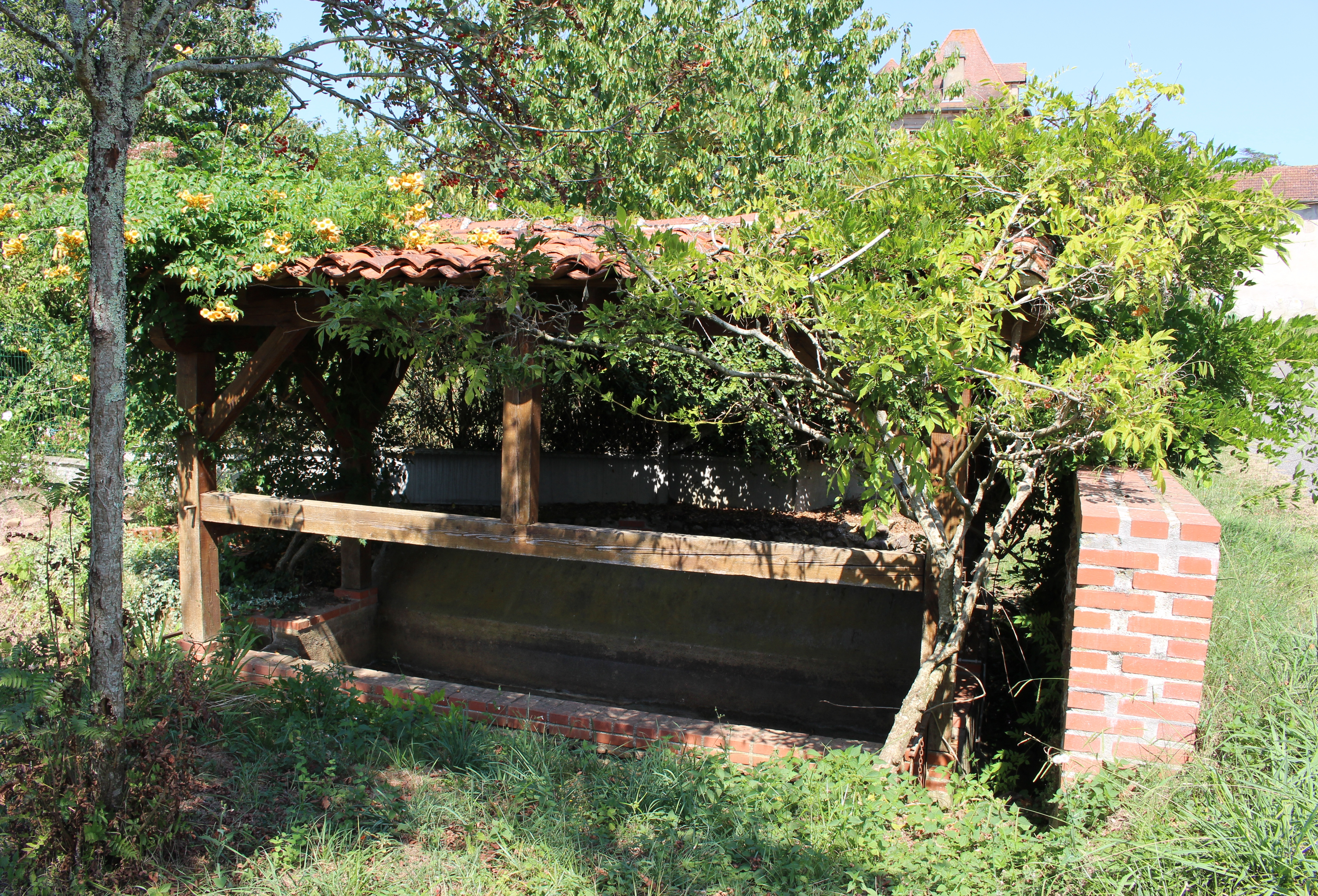 Lavoir de Lascazères (Hautes-Pyrénées)